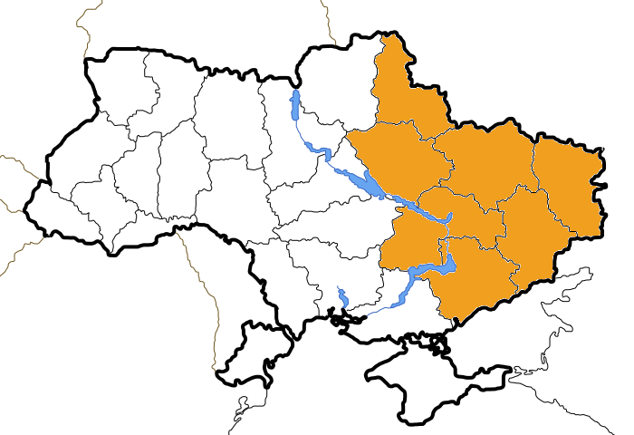 Харківсько-Запорізька дієцезія